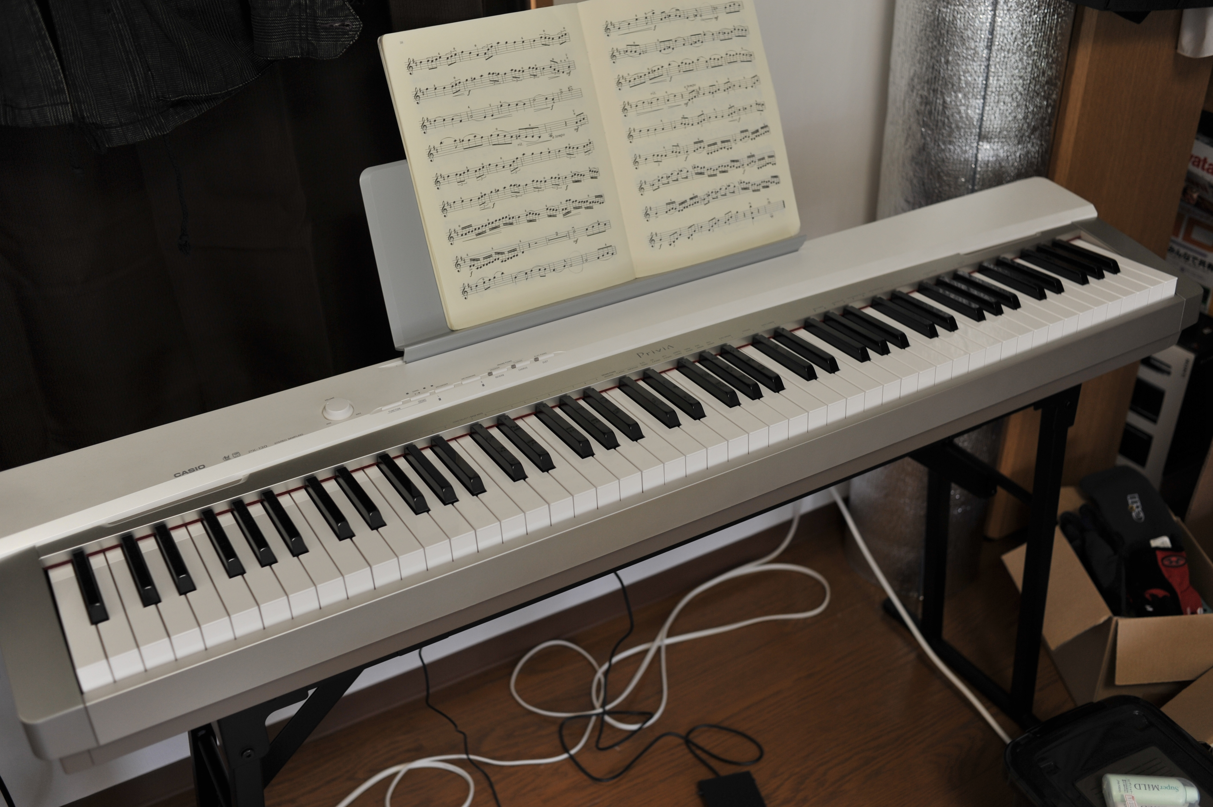 Casio Privia PX-130 (White) スタンドと同時購入